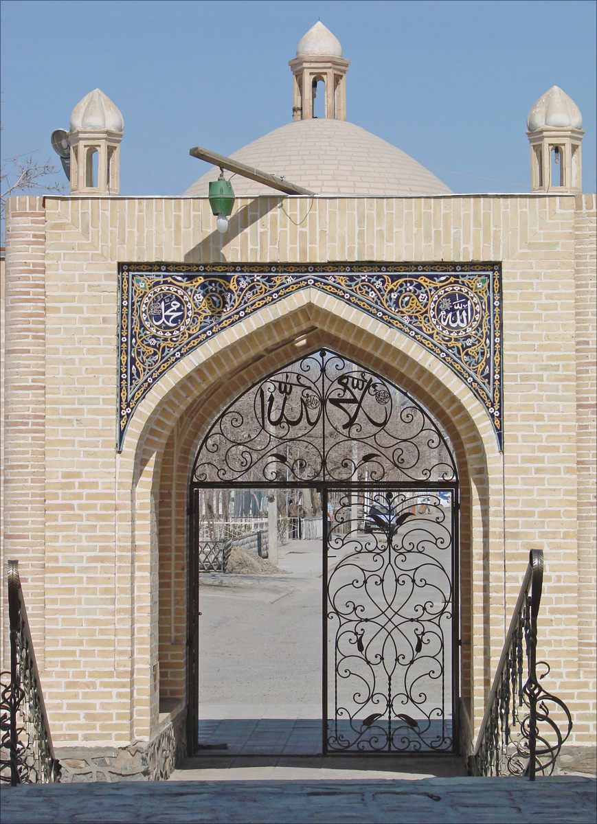 La mosquée Baland (Balyand), qui est une mosquée de quartier, est une des plus belles de Boukhara. Photo Annie Dalbéra